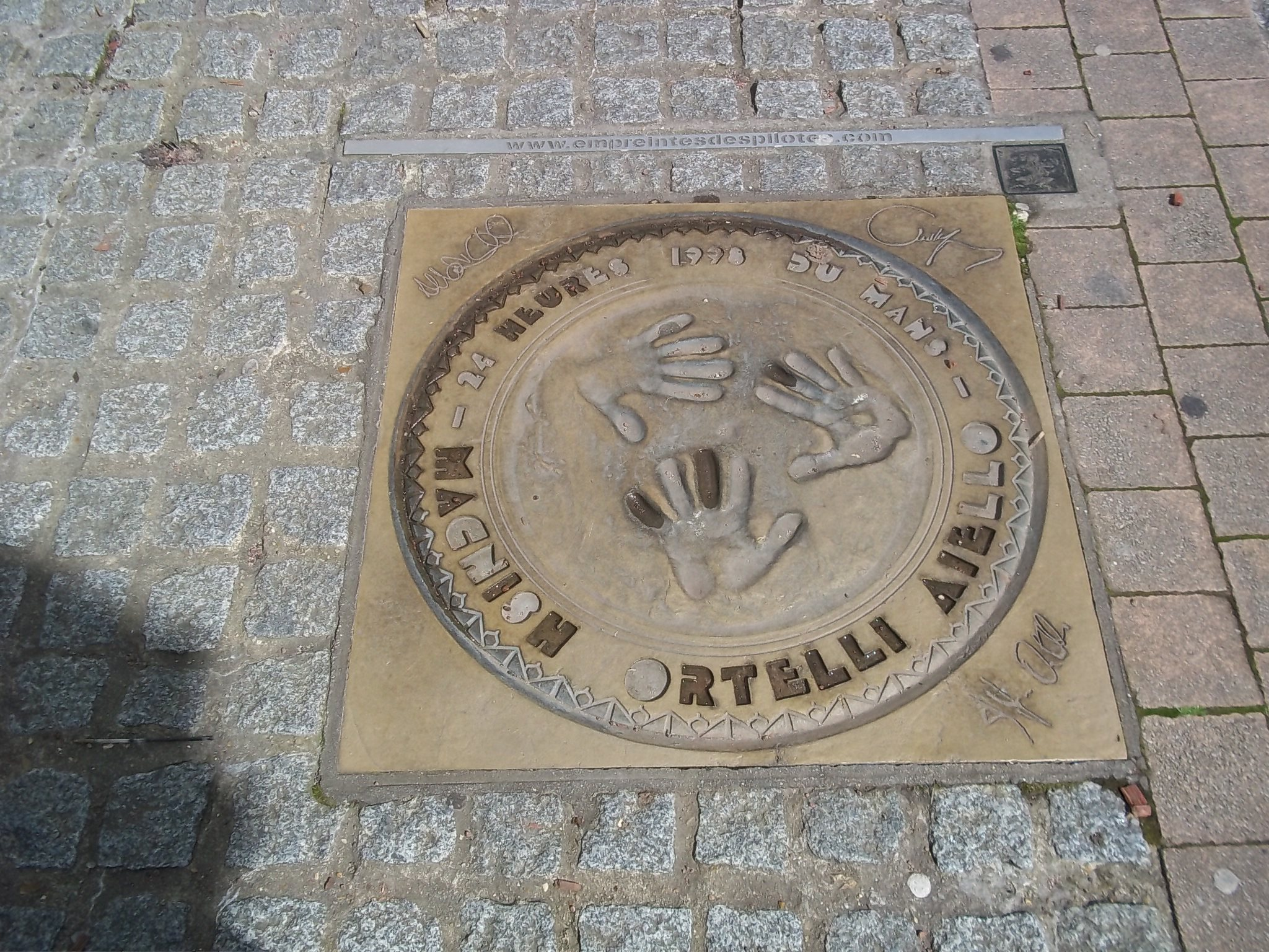 Plaque de bronze des empreintes des vainqueurs des 24 heures 1998